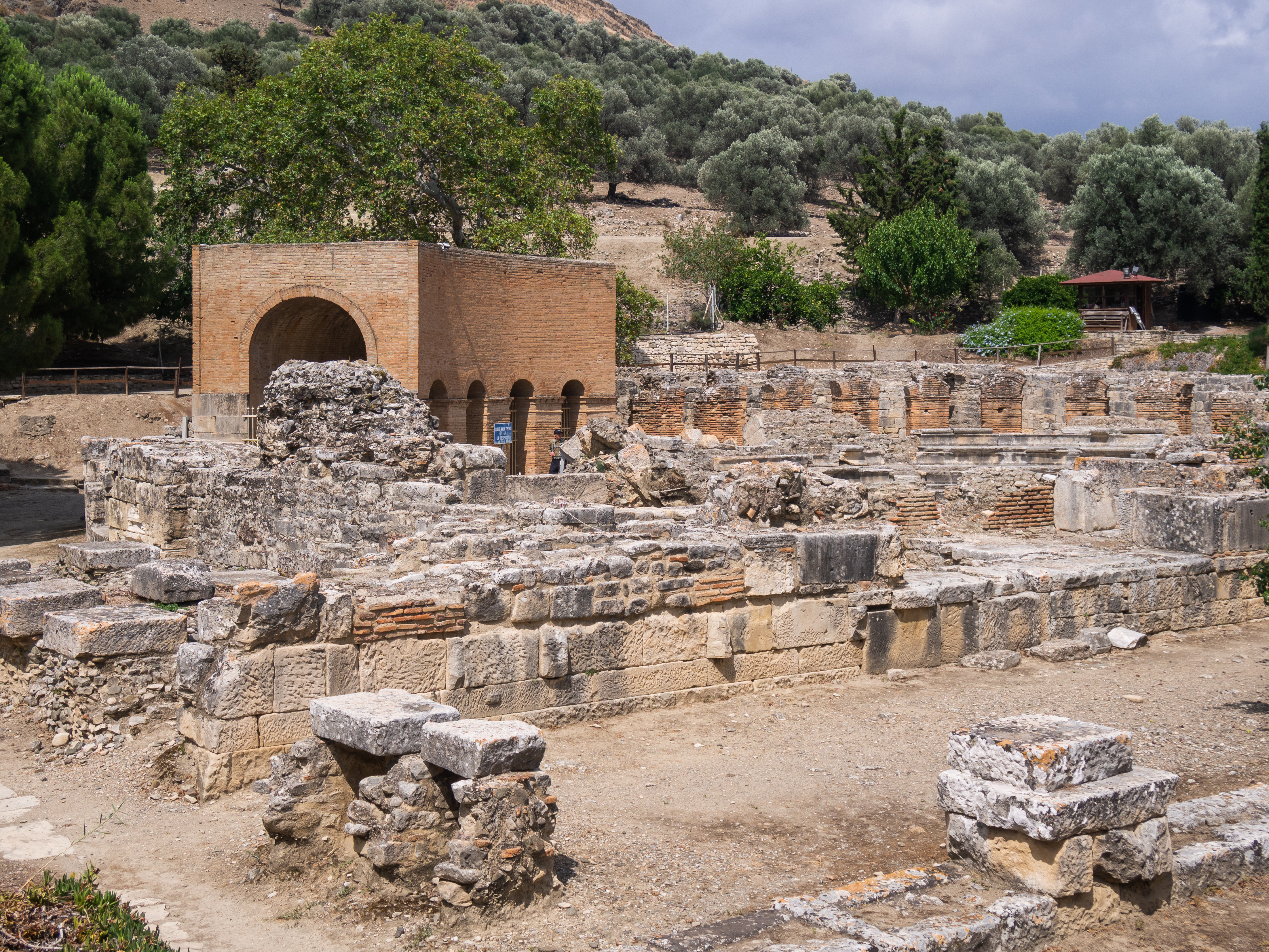 Ωδείο Γόρτυνας«Ωδείο Γόρτυνας»